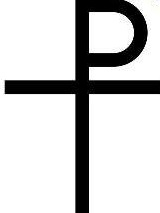 Staurogram